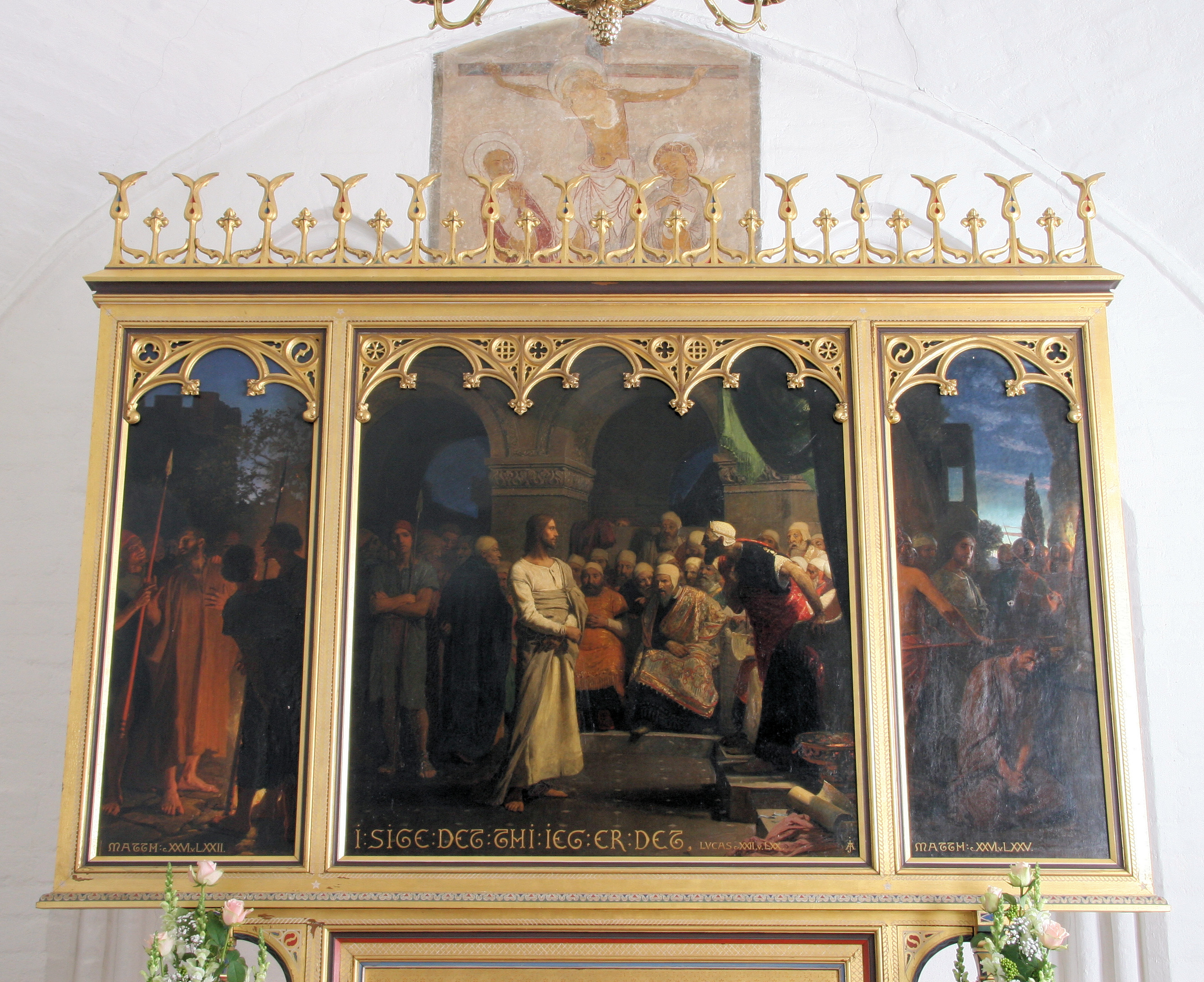 Sankt Peders Kirke in Slagelse, Denmark. Altarpiece